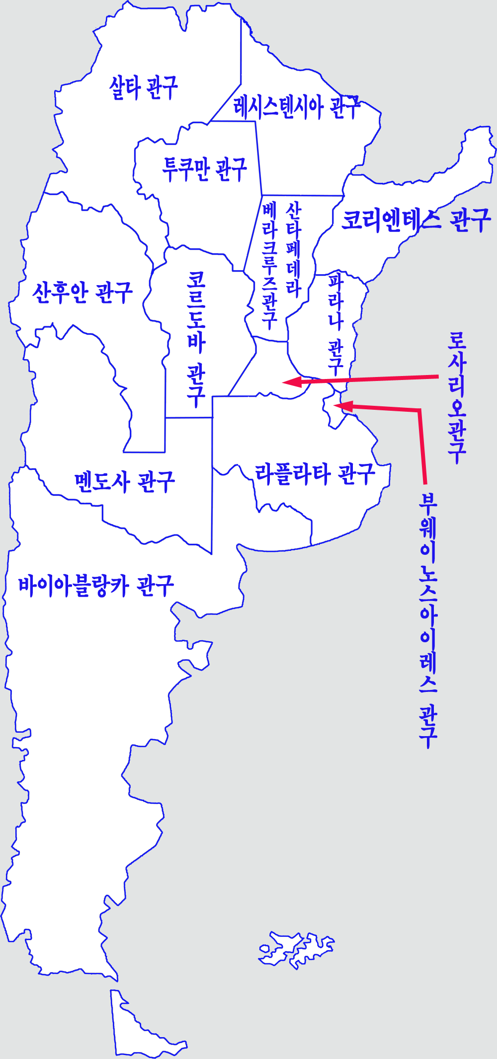 아르헨티나의 가톨릭관구도